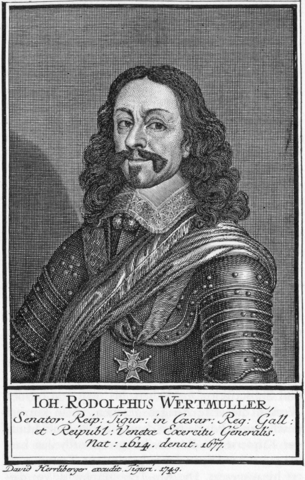 Hans Rudolf Werdmüller, Schweizer Offizier in fremden Diensten aus Zürich. Stich von David Herrliberger